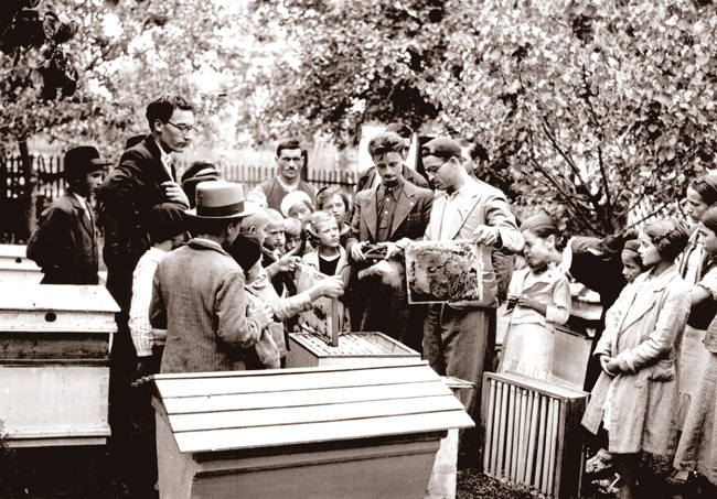 Echipa de cercetare coordonate de profesorul Dimitrie Gusti